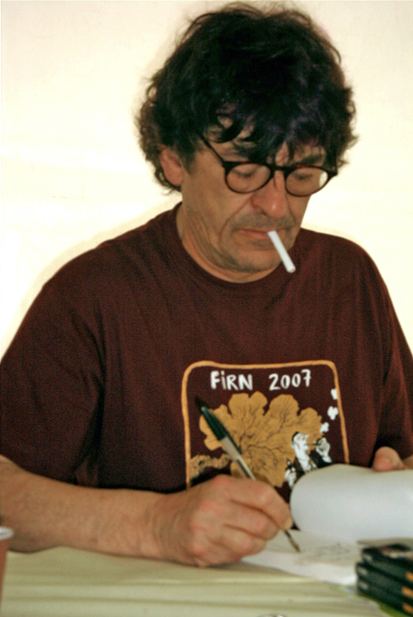 Photographie de Jean-Bernard Pouy